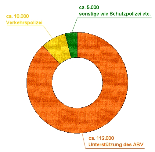 Anzahl der freiwilligen Helfer der Volkspolizei zum 25. September 1977 gegliedert nach ihrem Tätigkeitsfeld